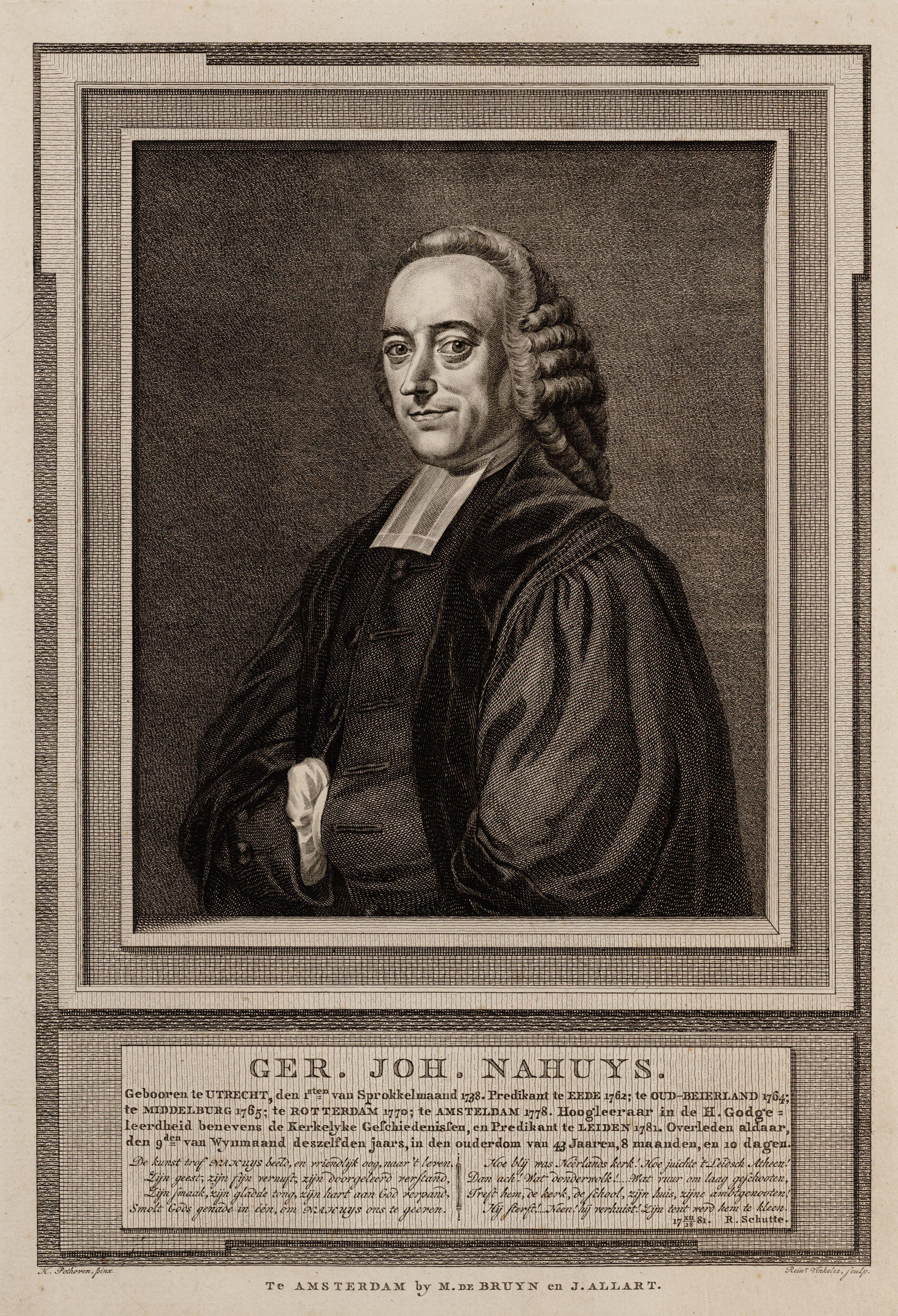 Beschrijving Ger. Joh. Nahuys (01-02-1738 / 09-10-1781) Predikant te Amsterdam later hoogleraar in de theologie in Leiden. Afmetingen: 289 x 179 mm. Documenttype prent Vervaardiger Bruyn, M. de (uitgever) Pothoven, Hendrik Vinkeles, R. (Reinier ; 1741-1816) Allart, Johannes Collectie Collectie Stadsarchief Amsterdam: tekeningen en prenten Datering 1781 Inventarissen Afbeeldingsbestand 010097008932